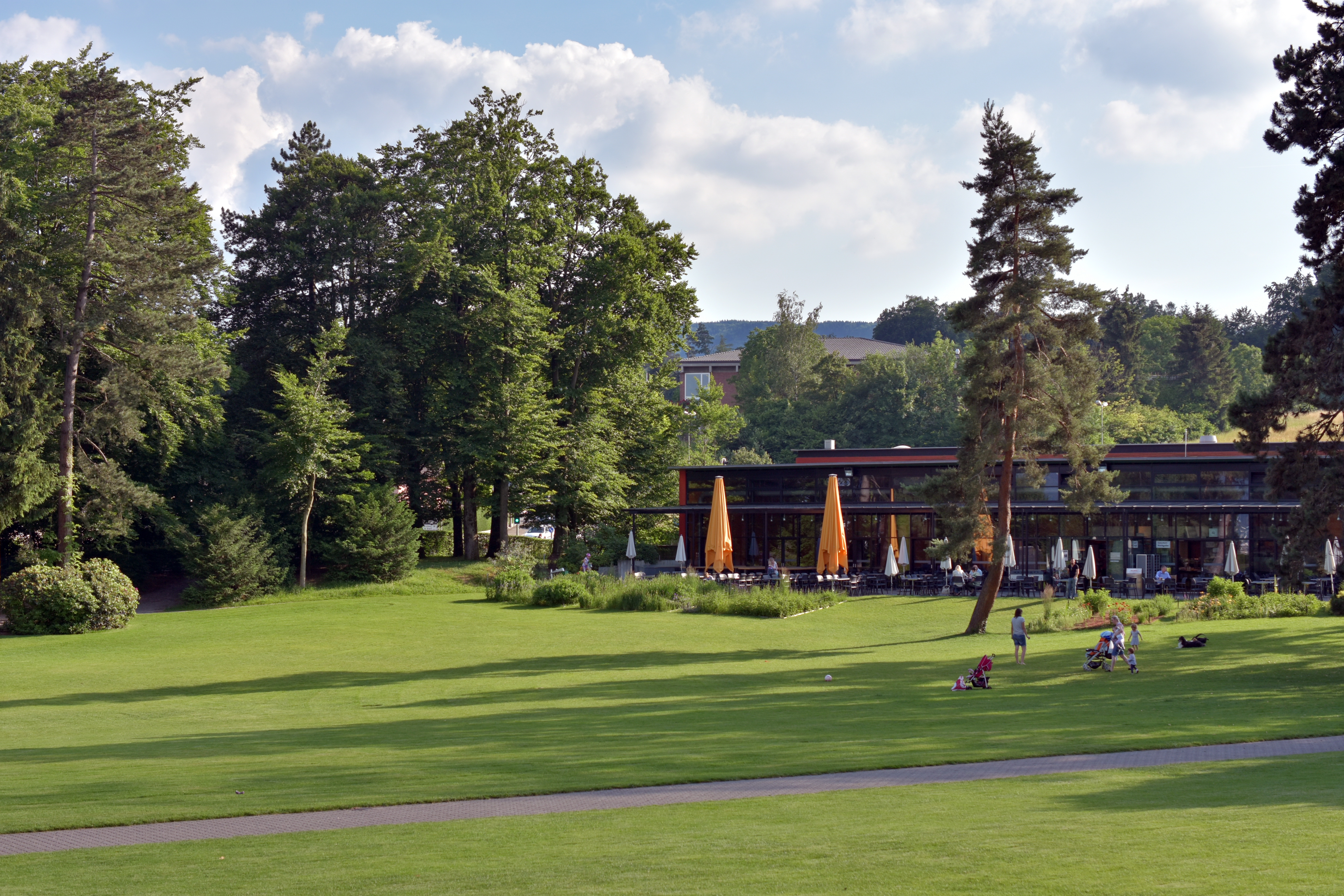 Adele & Gottlieb Duttweiler's' Park im Grüene in Rüschlikon (Switzerland)